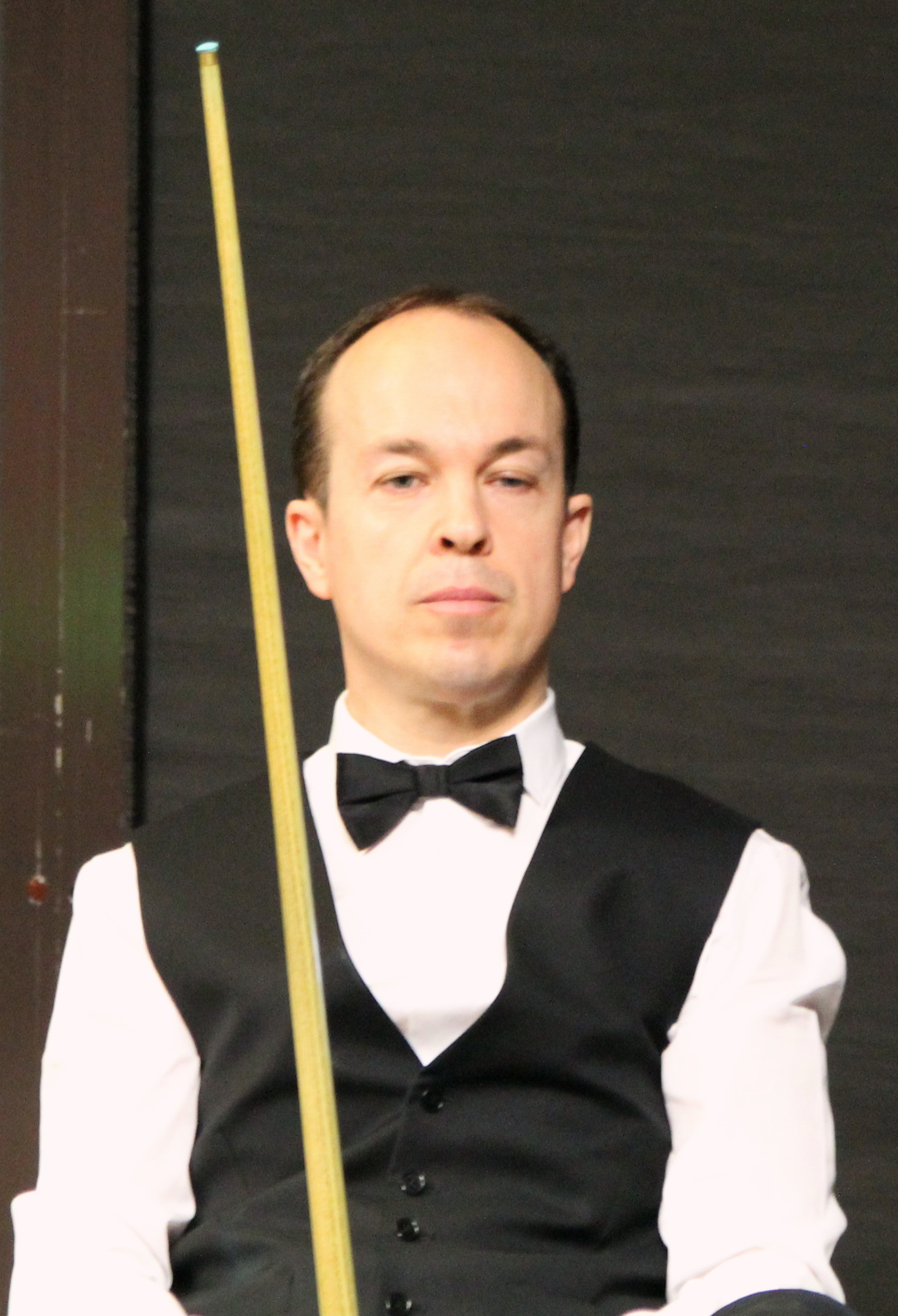 Fergal O’Brien beim Paul Hunter Classic 2016